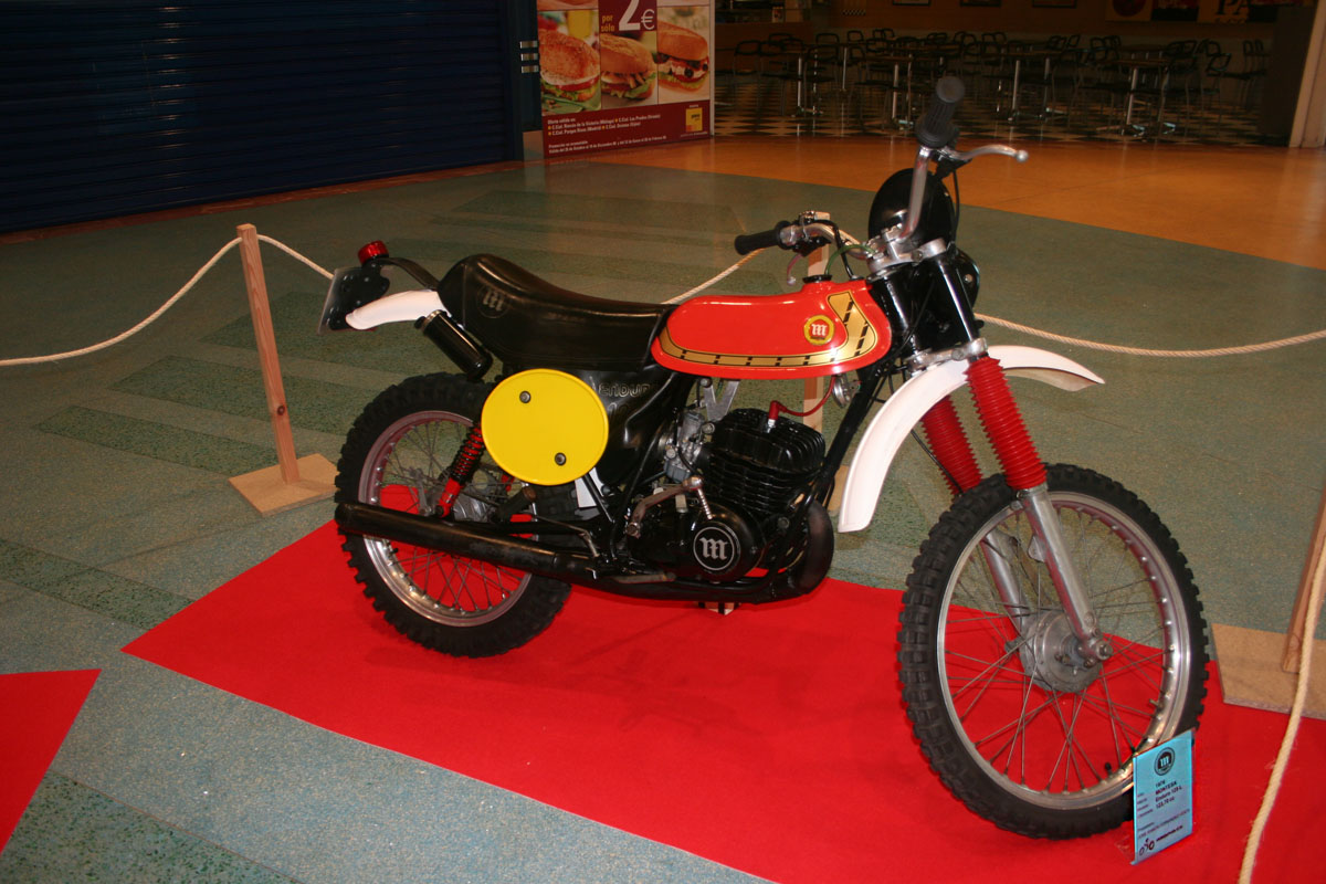 Montesa Enduro 125 L, 1978.jpg 123,70 cc.